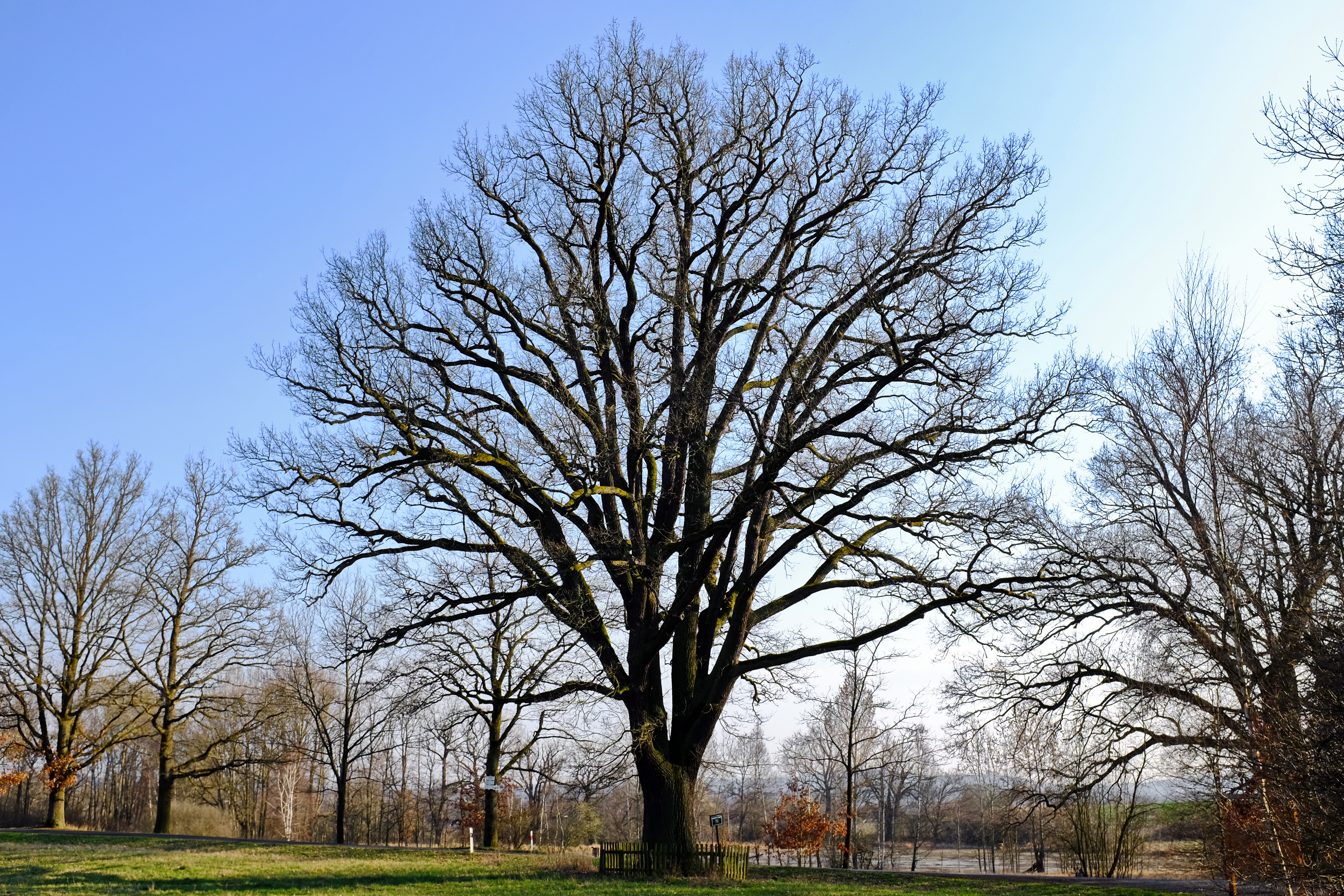 Památný strom - Dub letní ve Dvorečku, okres Cheb